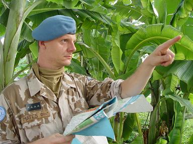 Příslušník AČR působící v mírové operaci OSN MONUC ve funkci vojenského pozorovatele.